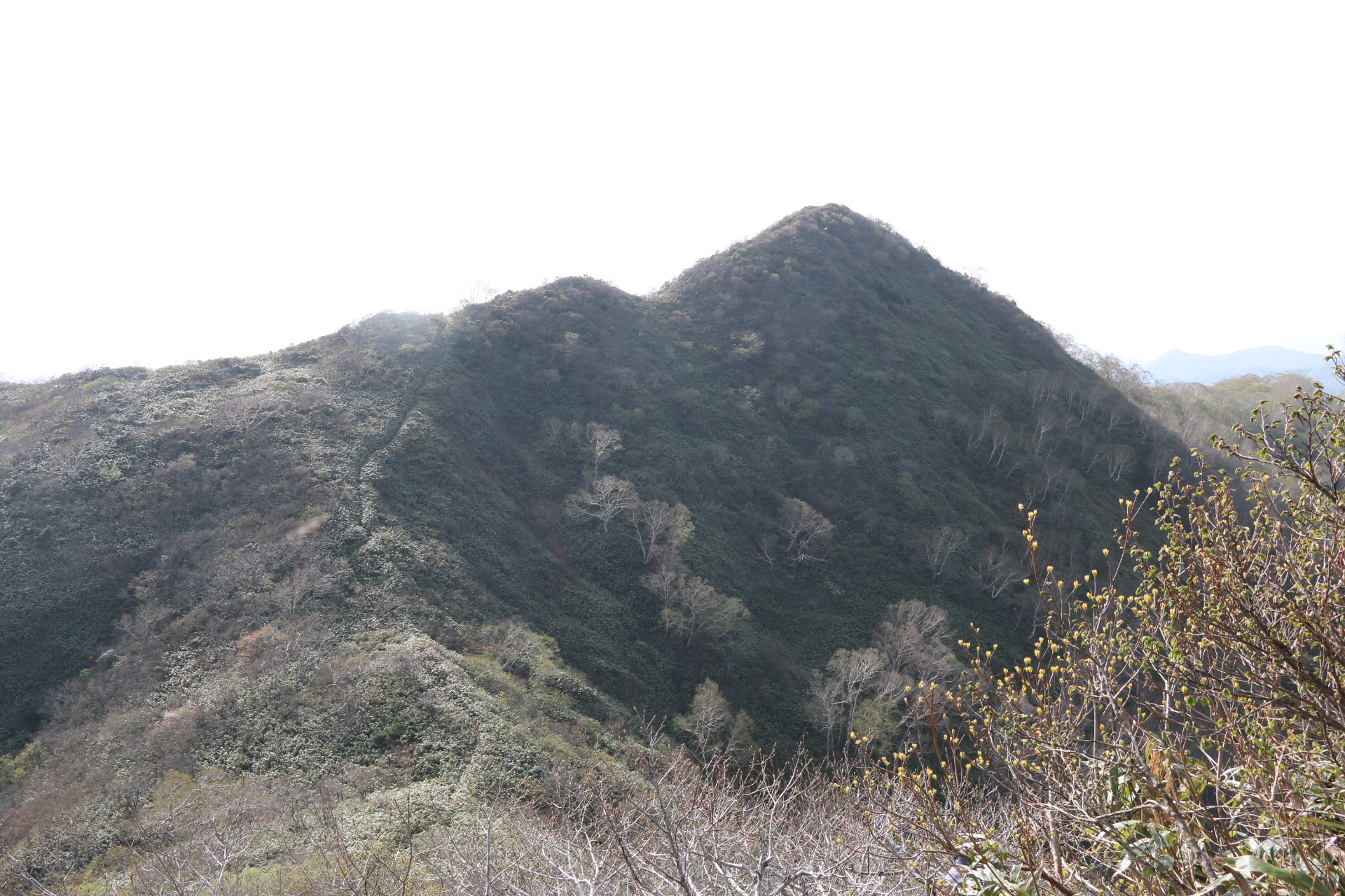 小稲包から稲包山を望む